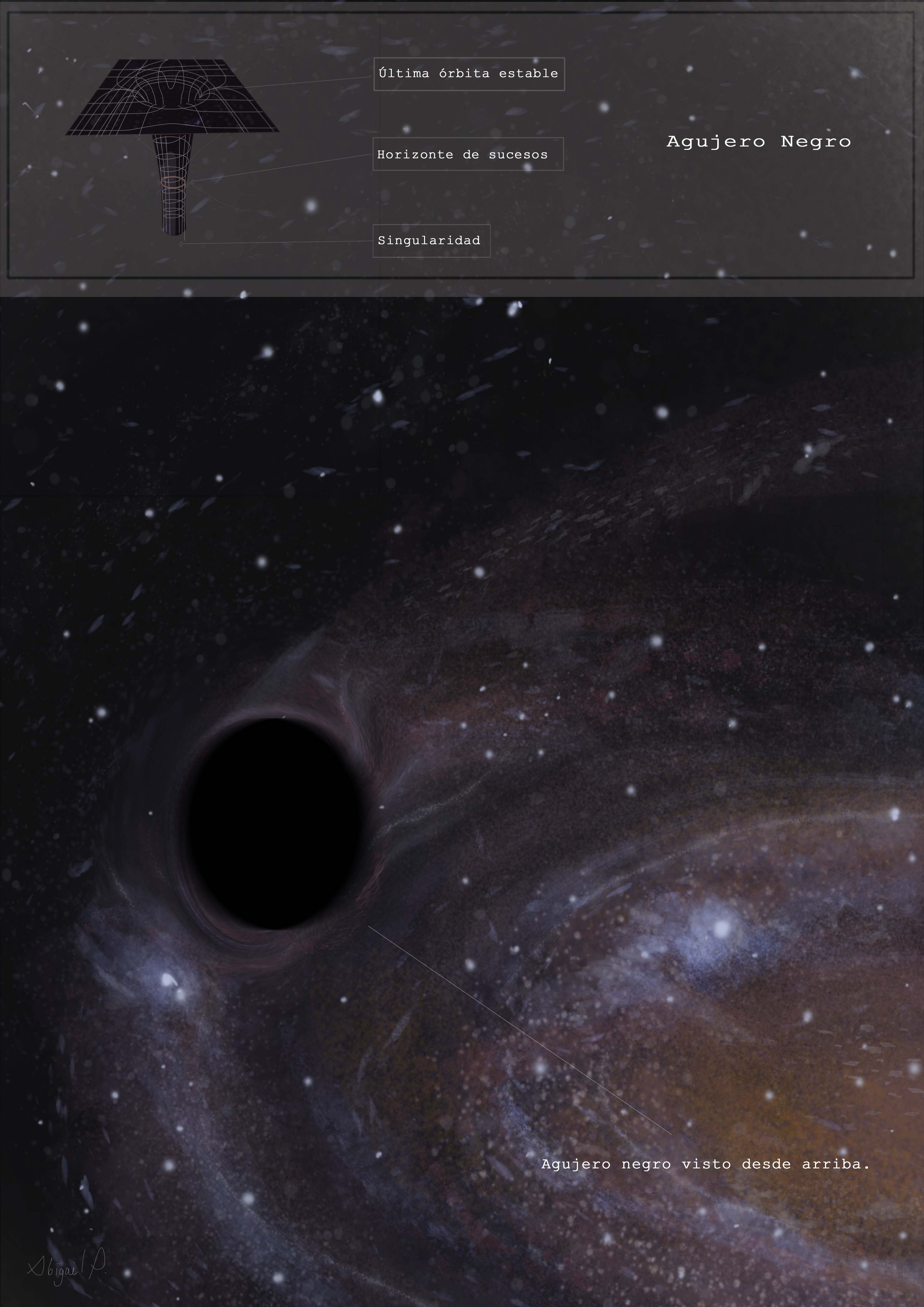 ¿Cómo se vería un agujero negro si estuvieses justo arriba de este? Con esta pregunta como parteaguas, busqué ilustrar el comportamiento de uno de los fenómenos físicos más fascinantes dentro de la astronomía, el agujero negro, está representado aquí como un circulo totalmente negro, distorsiona a su alrededor todo lo que tenga cerca. Arriba de la imagen principal, se puede observar una pequeña gráfica donde se pretende ilustrar el modo en que el agujero negro cuya gravedad es inmensa, modifica la malla espacio/tiempo produce una muy característica curvatura, la cual genera una singularidad o punto de no retorno, llamada horizonte de sucesos de donde ni siquiera los fotones podrán escapar.